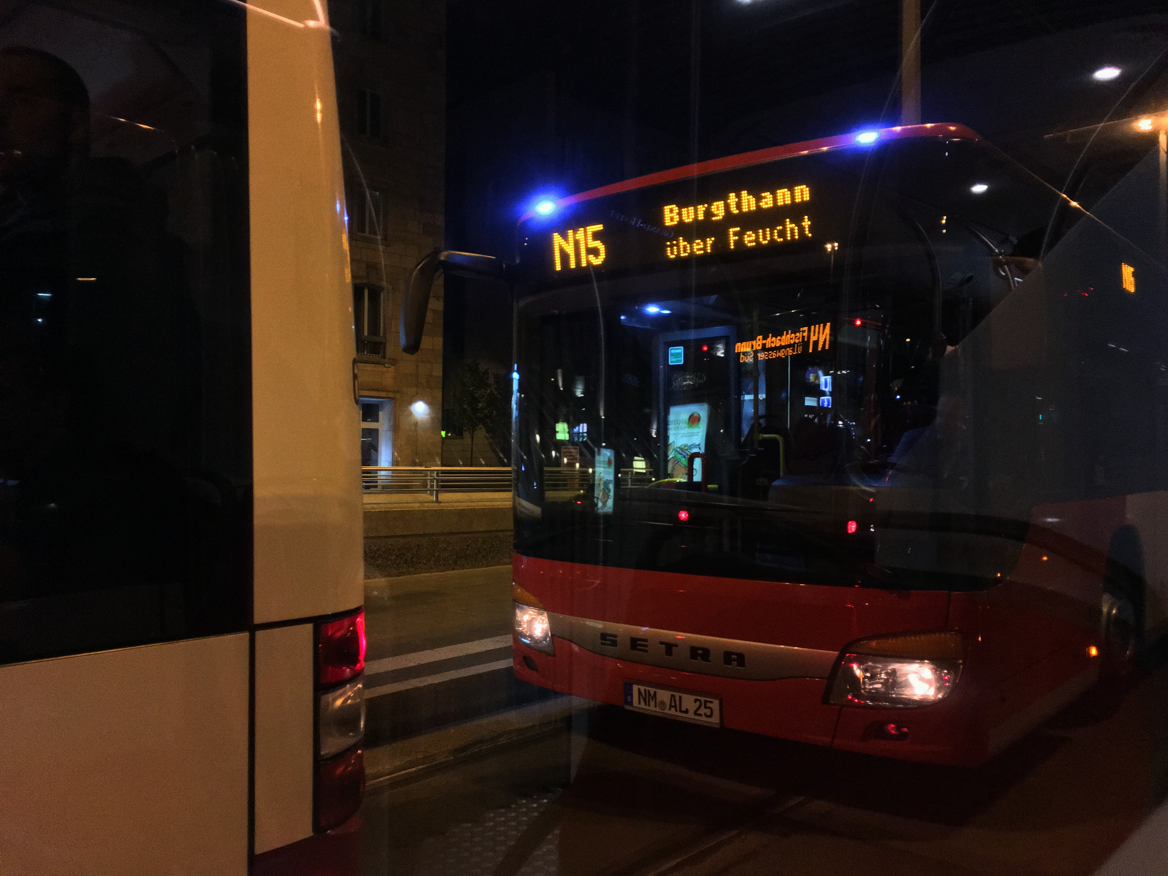 Nightlinerhaltestelle am Hauptbahnhof in Nürnberg